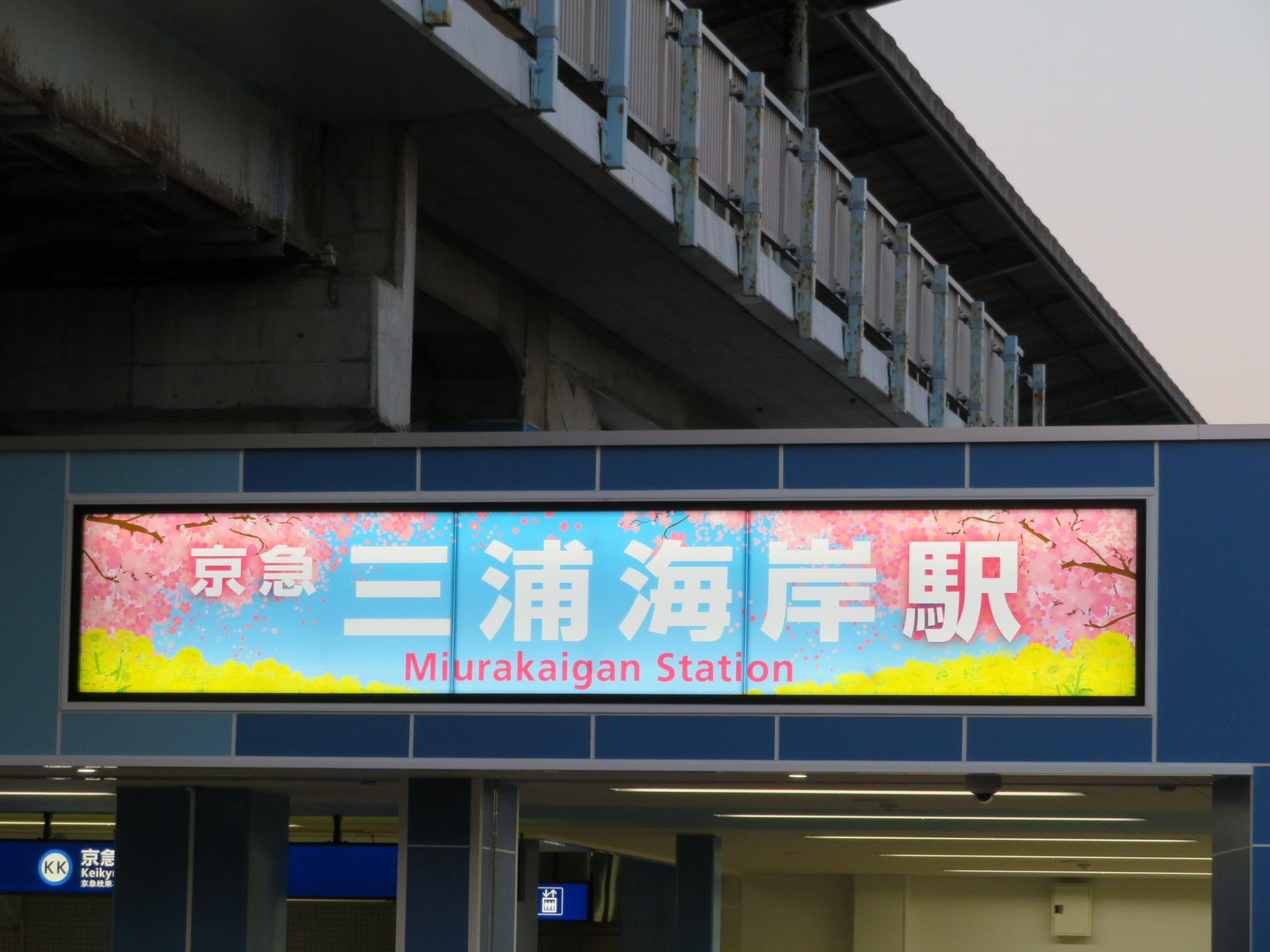 三浦海岸のさくら駅名標 2019年